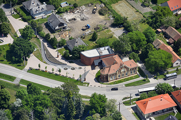 Martonvásár a magasból fényképezve